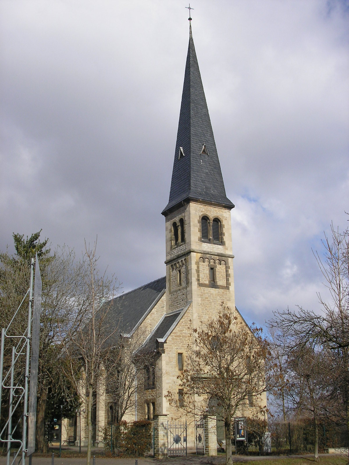 Die Gustav-Adolf-Kirche in Erfurt (Thüringen).